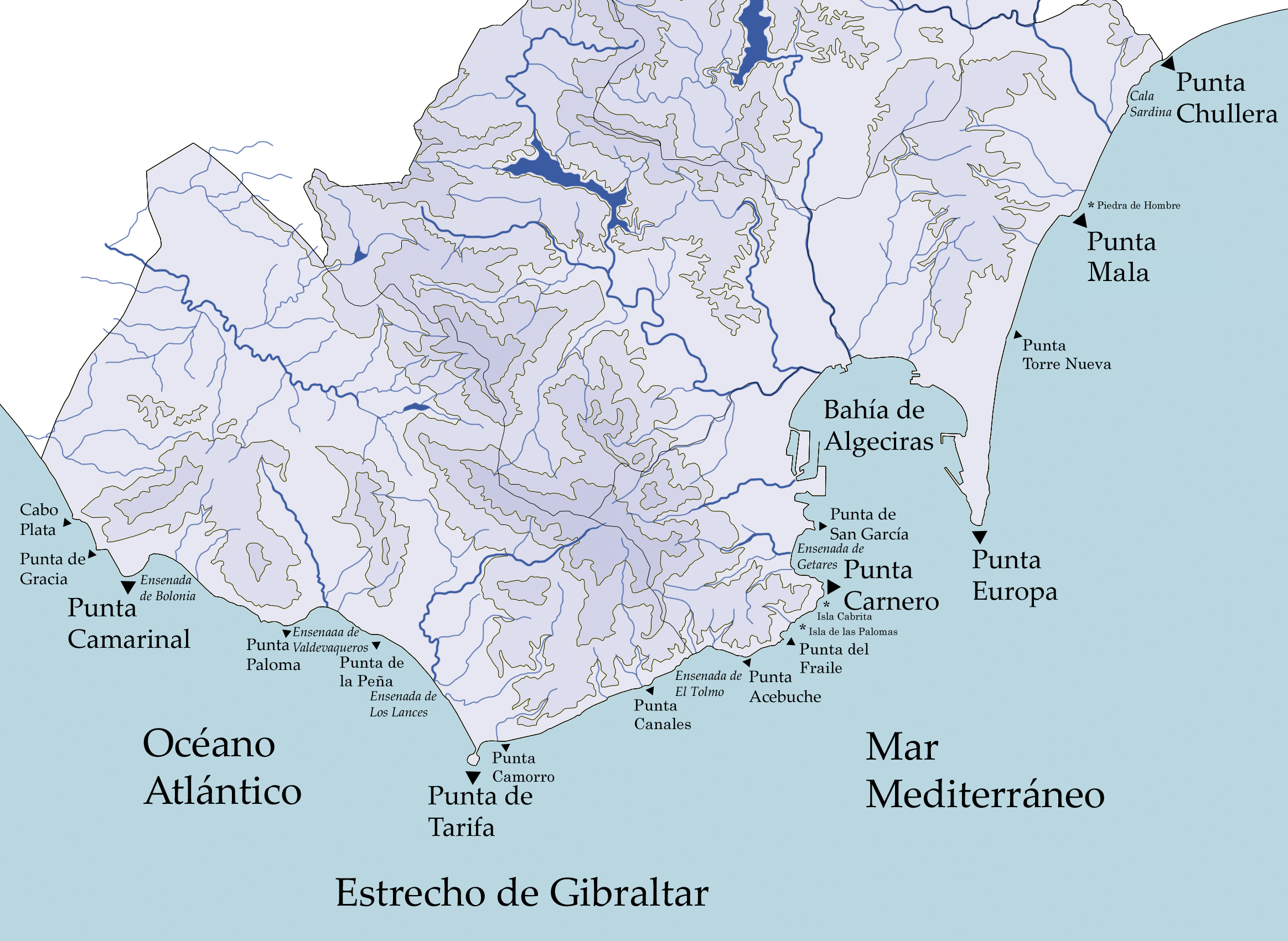 Descripción de la costa del Campo de Gibraltar, Andalucía, España